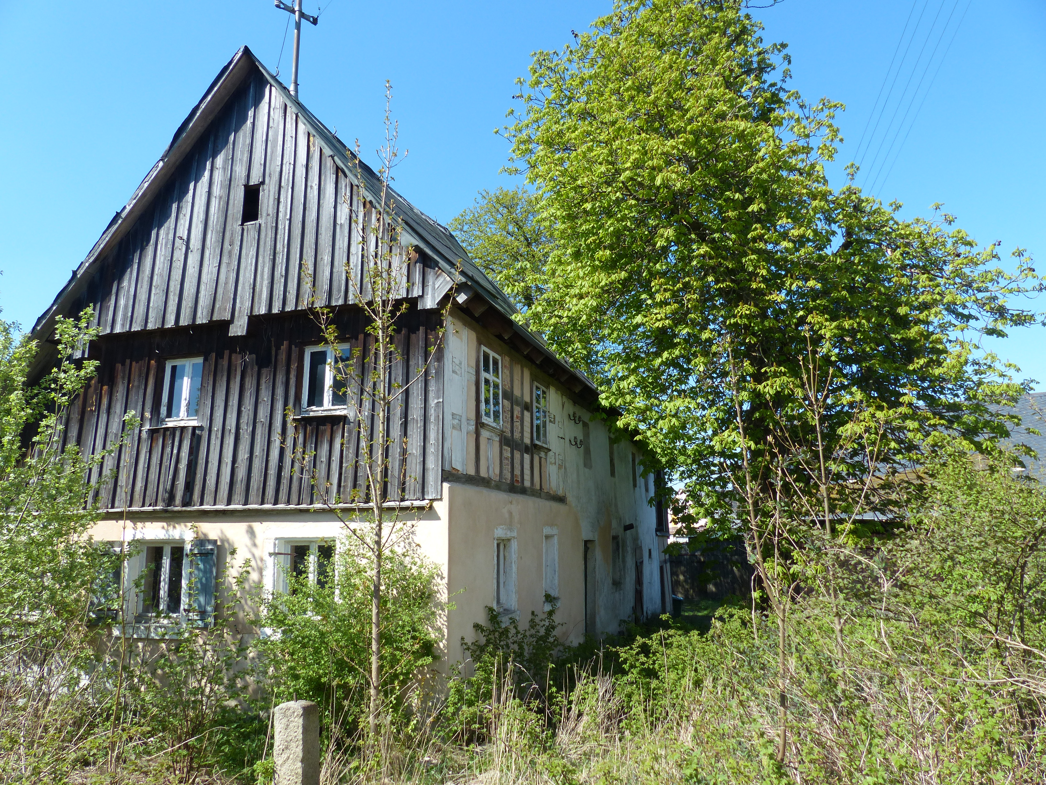 Bilderserien Ortsansichten von Kleinschwarzenbach, darunter Baudenkmäler und Weberhäuser